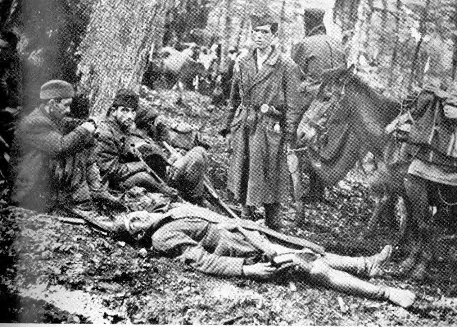 На фотографии изображены бойцы 1-го батальона 2-й Далматинской пролетарской бригады в момент отдыха в перерыве между двумя налётами немецкой авиации 9 июня 1943 года во время Битвы на Сутьеске. Место, где разместились партизаны, находилось на расстоянии около 300 метров от укреплённых немецких позиций на горе Кошур. Фотография известного военного фотографа Жоржа Скригина была опубликована после войны тысячи раз в Югославии и за рубежом, демонстрировалась в экспозициях многих музеев СФРЮ под названиями «Бойцы Второй дивизии», «Тифозники», «Неизвестные партизаны на Сутьеске» и т. д.